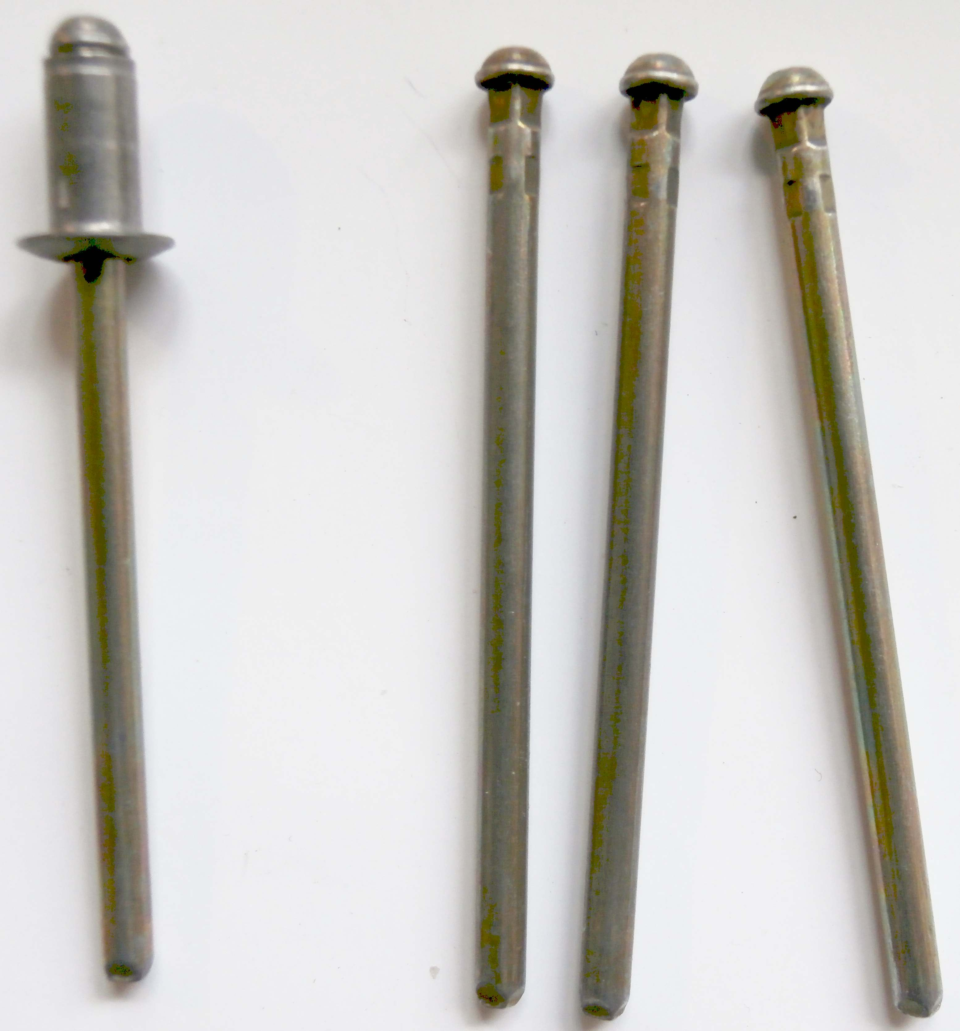 Blindnieten: die unterhalb des Kopfes sichtbare Kerbung entspricht einer Sollbruchstelle, an dieser Stelle reisst der Stift ab.